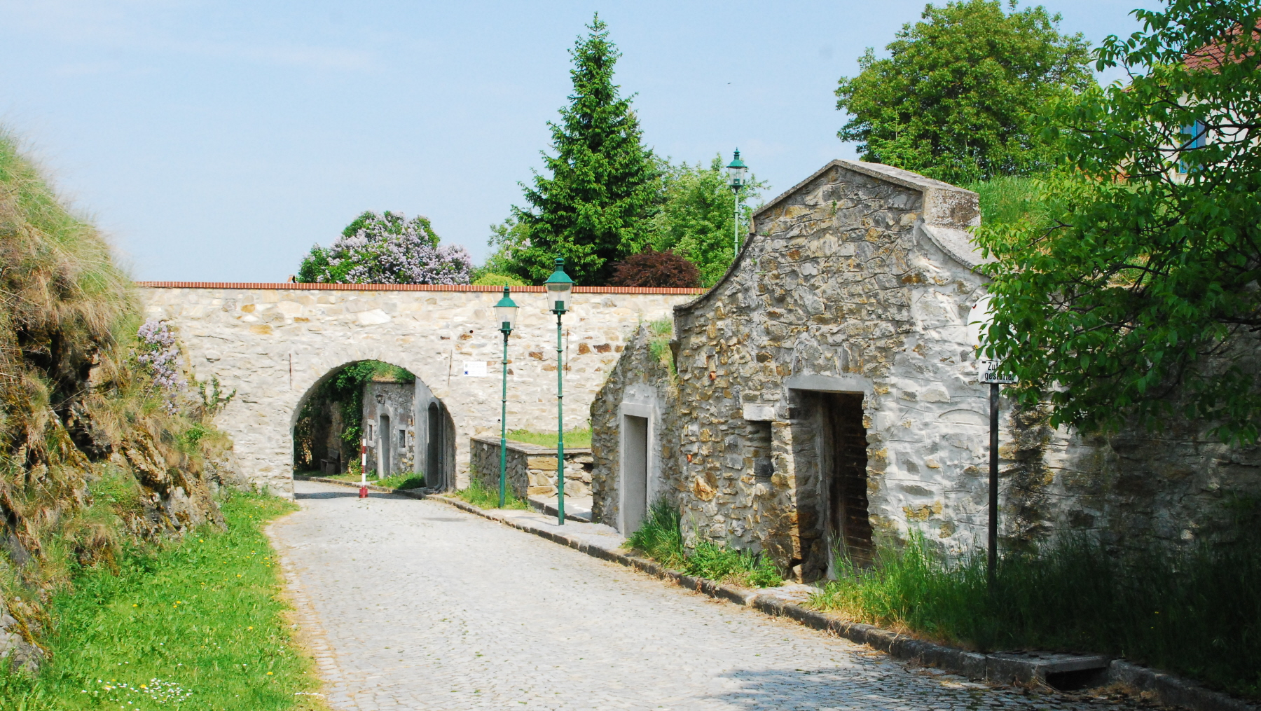 Fußgängerbrücke zur Kirche von Frauenhofen bei Horn in Niederösterreich